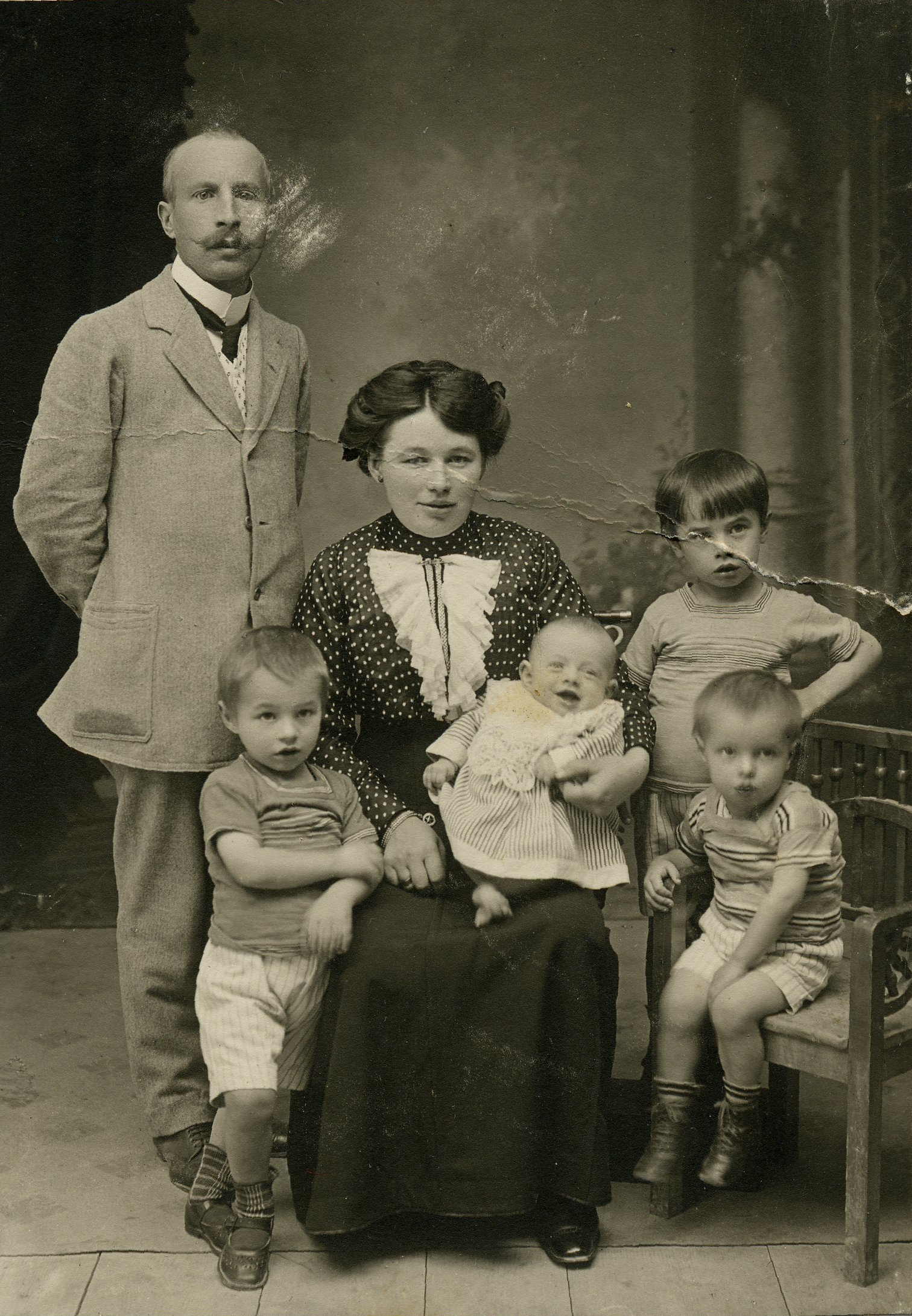 Družina Schollmayer.